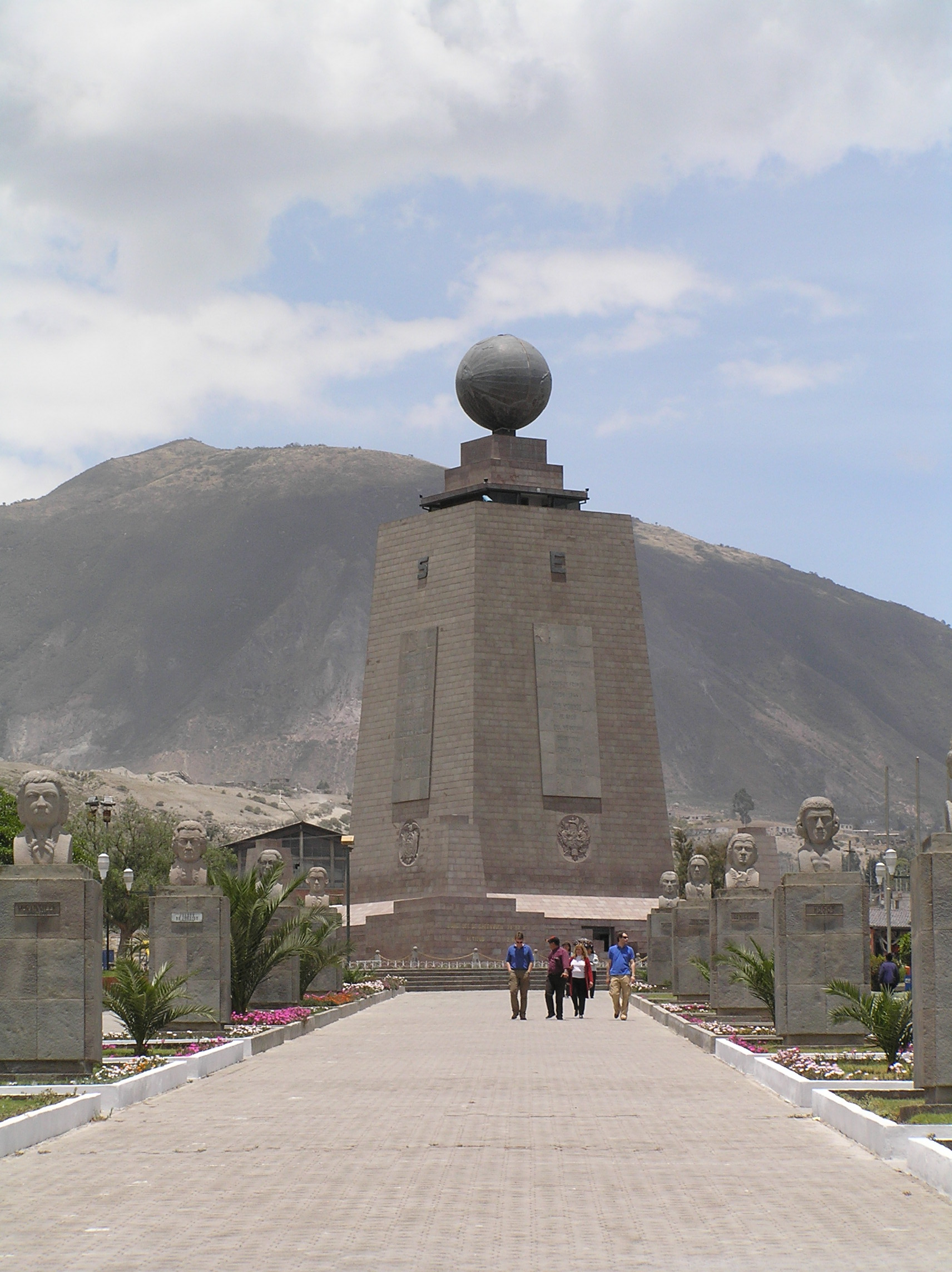 Avenida que conduce al Monumento a la Mitad del Mundo